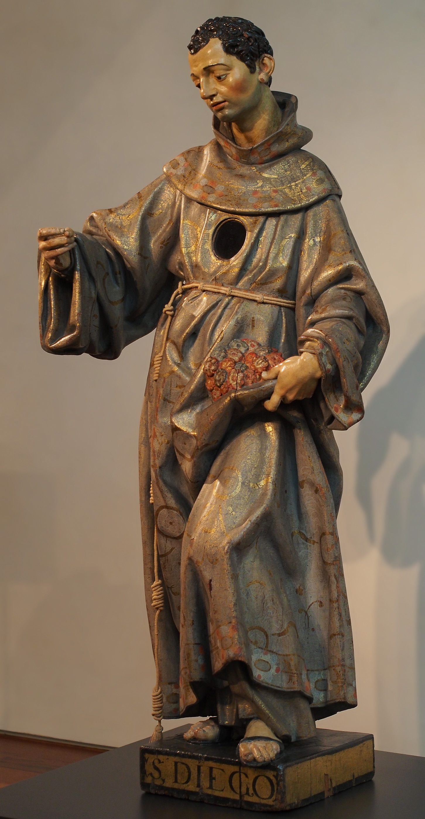 San Diego de Alcalá, c. 1605, por Gregorio Fernández (1576-1636). Museo Nacional de Escultura, Valladolid.